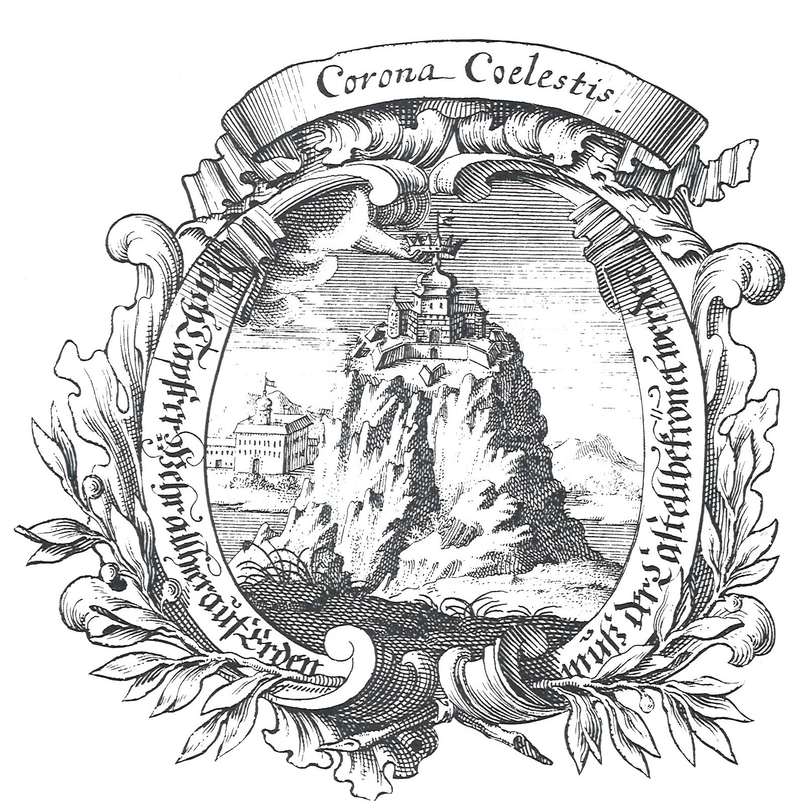 Detail des Titelkupfers der Leichenpredigt auf Graf Wolfgang Dietrich zu Castell. Ludwig Christoph Glotsch 1709, Nürnberg. "Obere und Untere Burg"